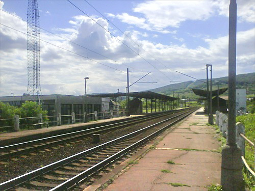 zeleznicna stanica vinohrady